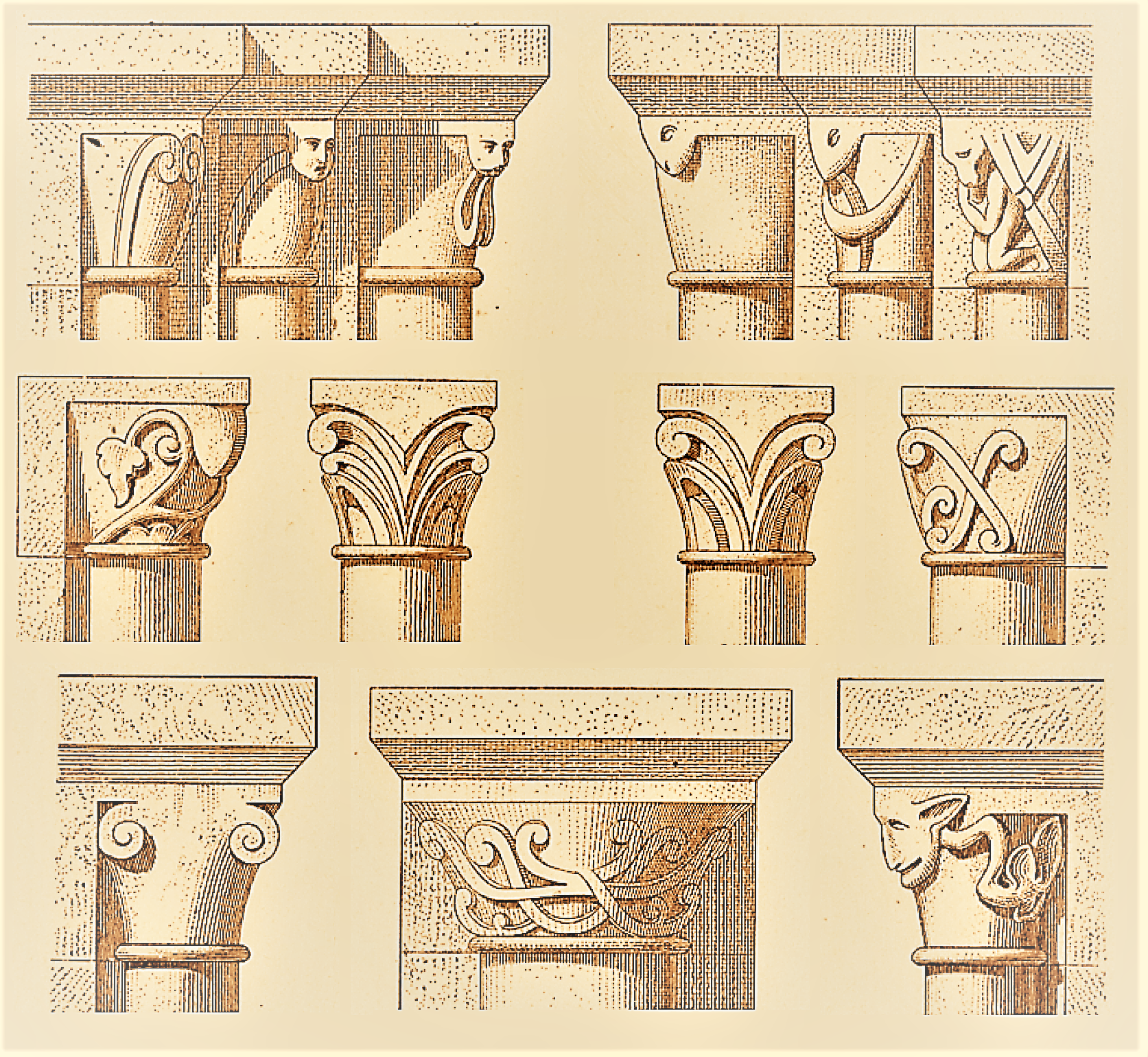 Eglise Notre-Dame-sur-l'Eau, Domfront, Sculptures (image du domaine public (Ruprich-Robert) modifiée)